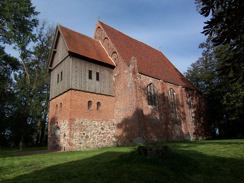 Kirche in Flemendorf, Mecklenburg-Vorpommern